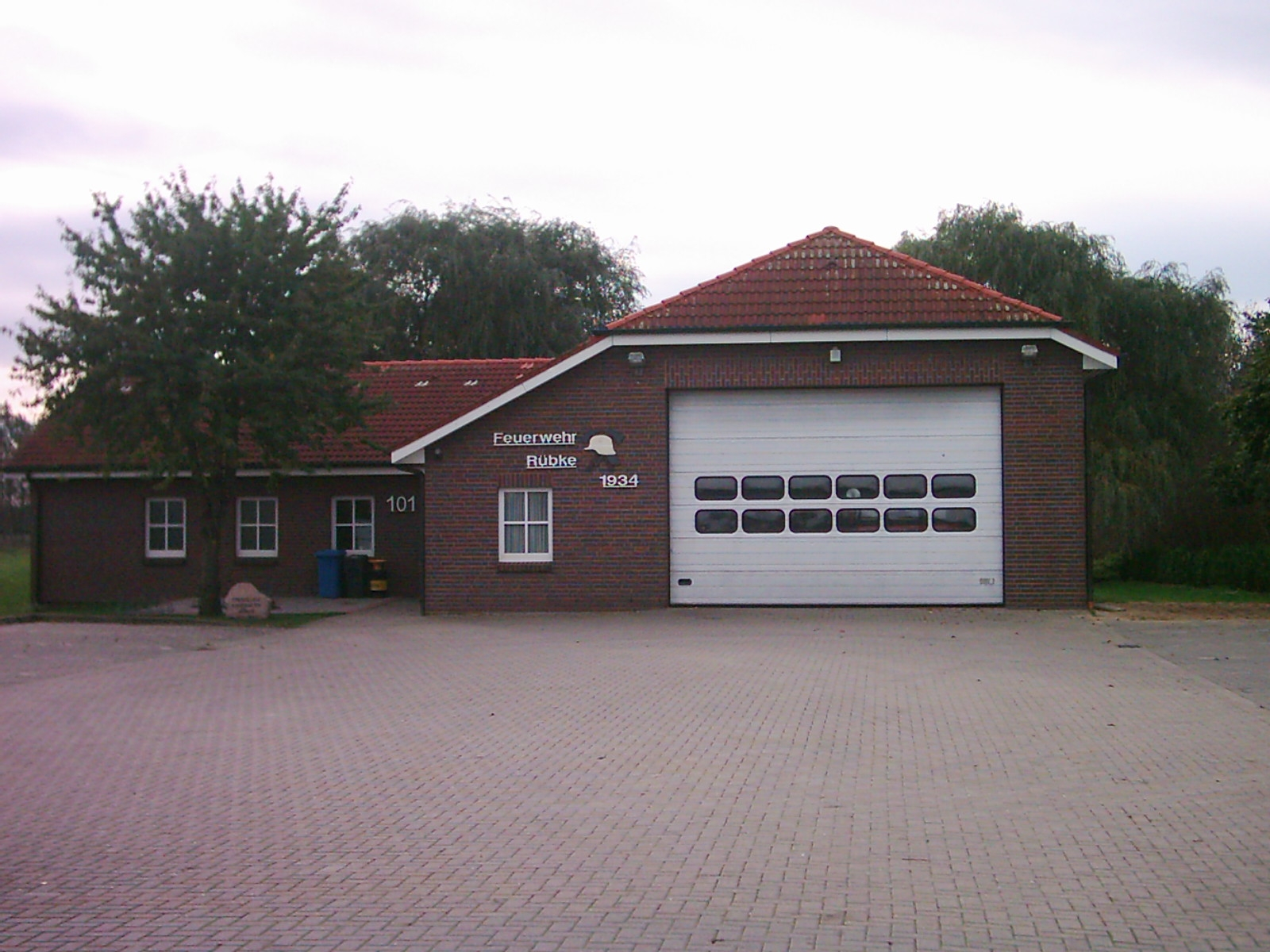 Gebäude der Feuerwehr Rübke, Neu Wulmstorf, Niedersachsen.